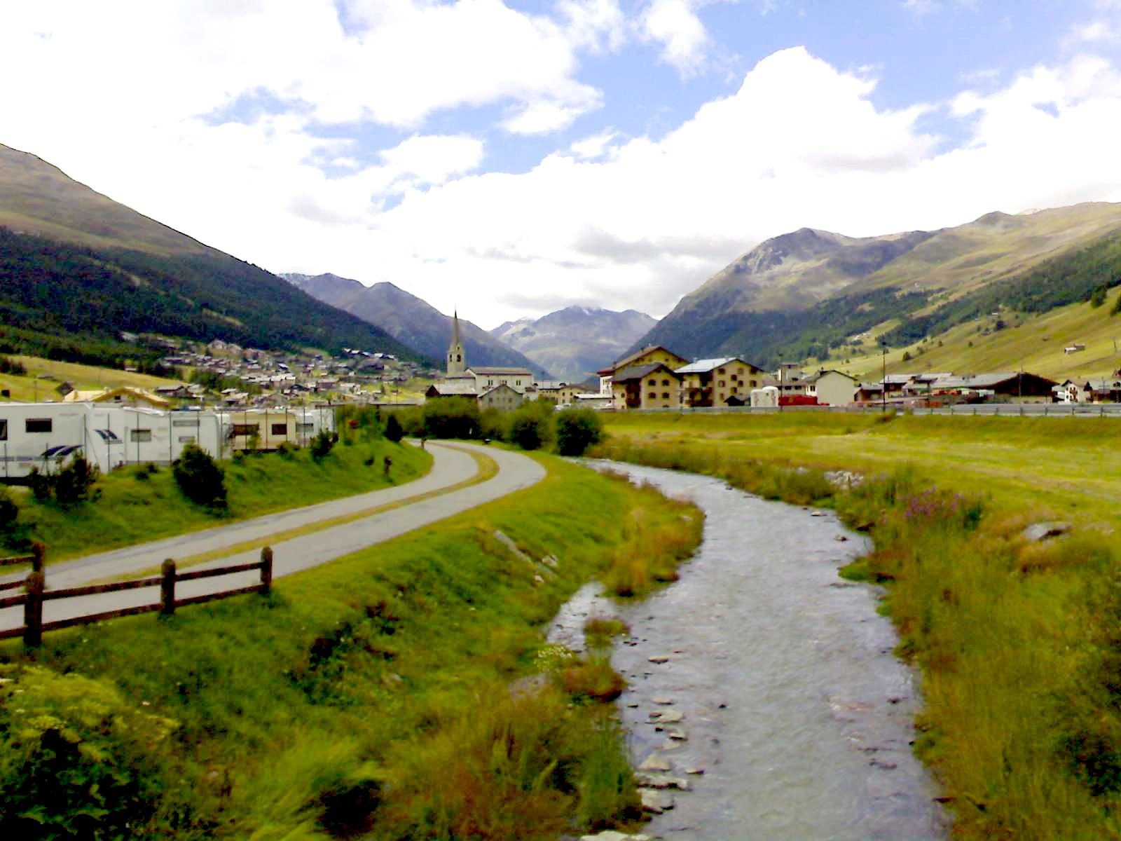 Livigno il fiume spöl